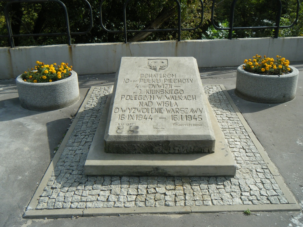 Tablica upamiętniająca żołnierzy 10. Pułku Piechoty 4. Dywizji im. J. Kilińskiego, poległym w walkach w okresie IX.1944-I.1945. Warszawa, Saska Kępa, al. Księcia Józefa Poniatowskiego, w pobliżu zjazdu na Wał Miedzeszyńskie.